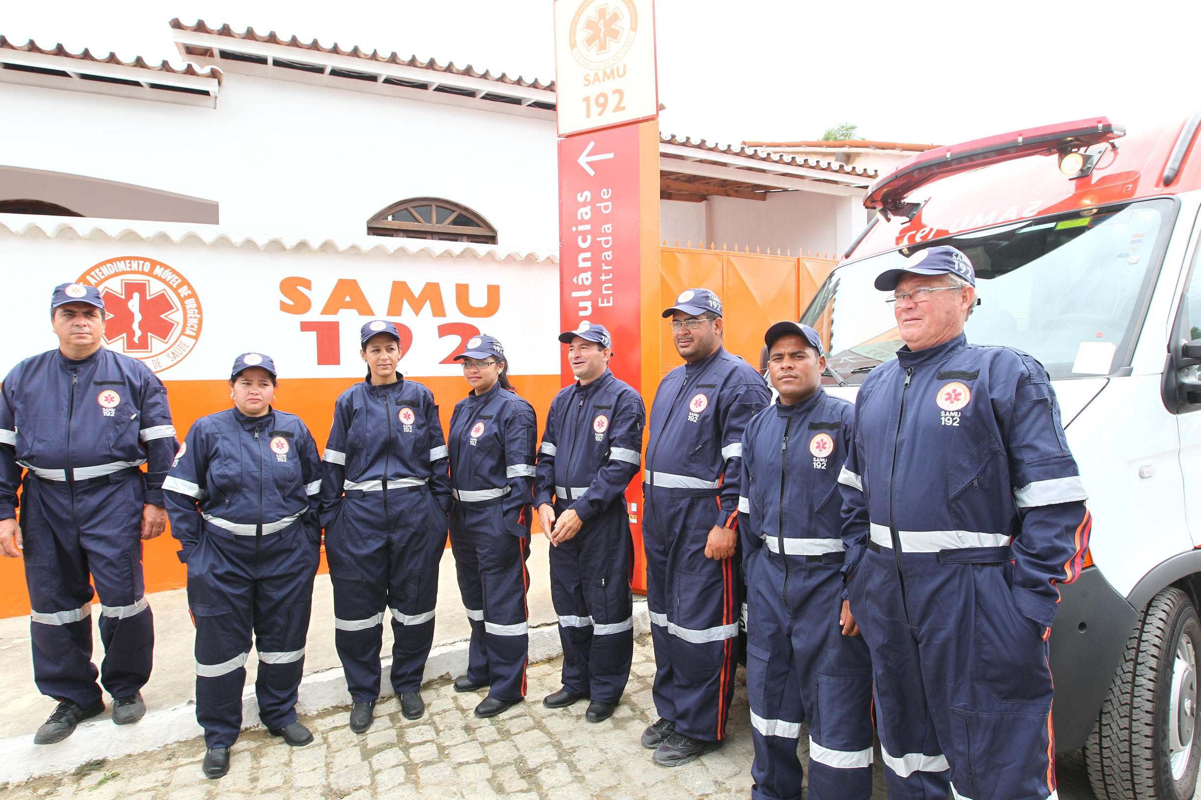 Governador Jaques Wagner inaugura o serviço Samu 192 no município de Planaltino. Foto Manu Dias/SECOM